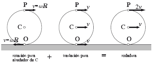 Rodadura